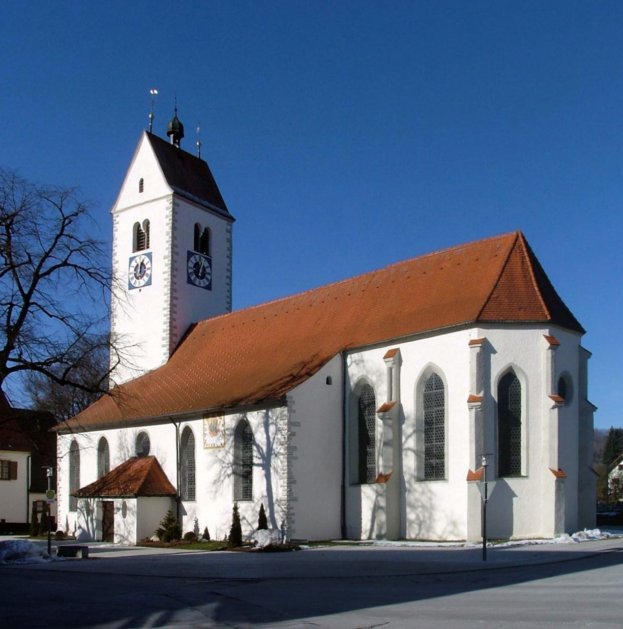 Wildpoldsried Pfarrkirche